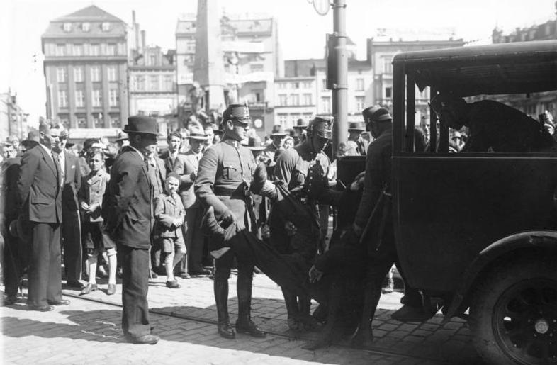 Der große Wahl-Sieg in Danzig! Ein Störenfried wird am Wahltag in Danzig von der Polizei verhaftet. Information added by Wikimedia users.